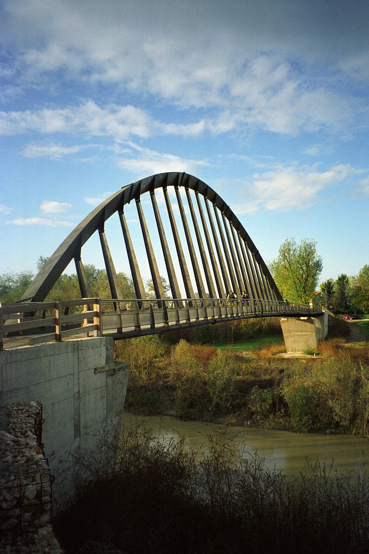 Campogalliano, Modena, Emilia Romagna, Italia